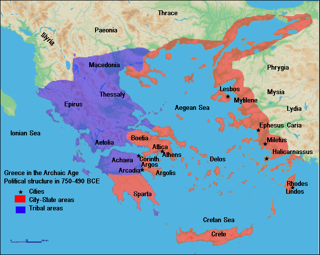 מפת יוון נחולקת לאיזורים שבטיים ואזורים עירוניים